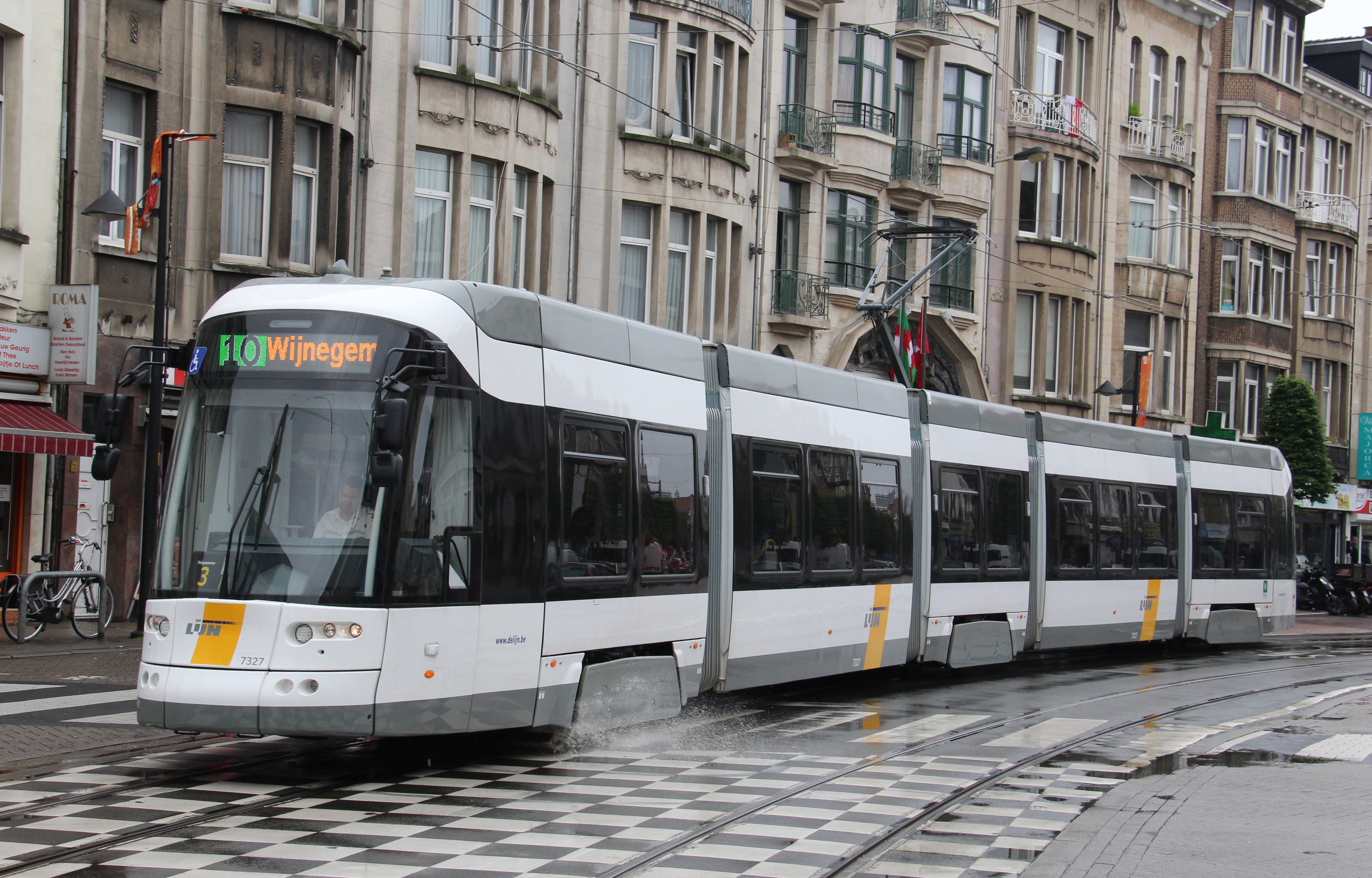 Een 5-delige Albatrostram in Antwerpen.